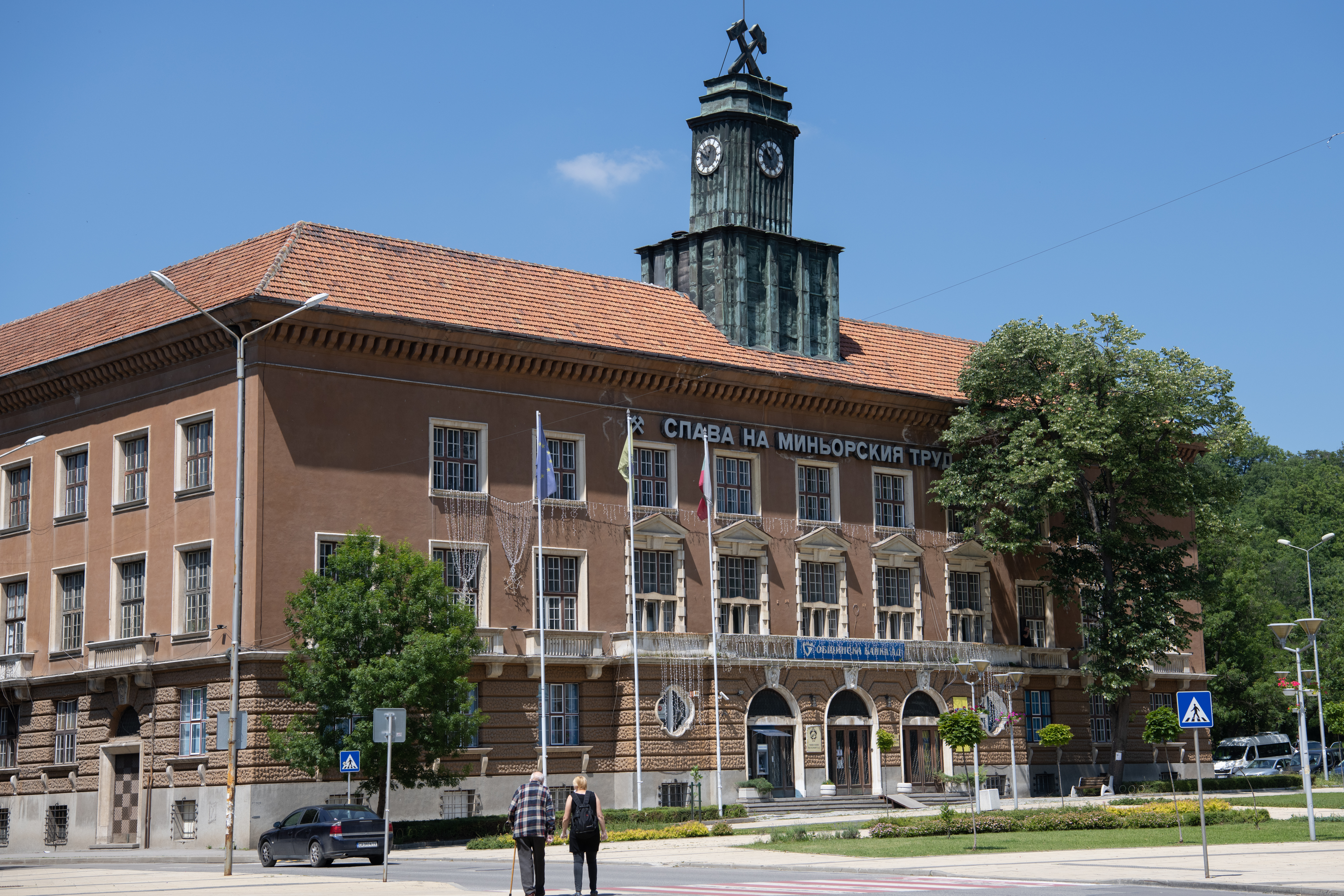 Снимката документира минната дирекция в град Перник